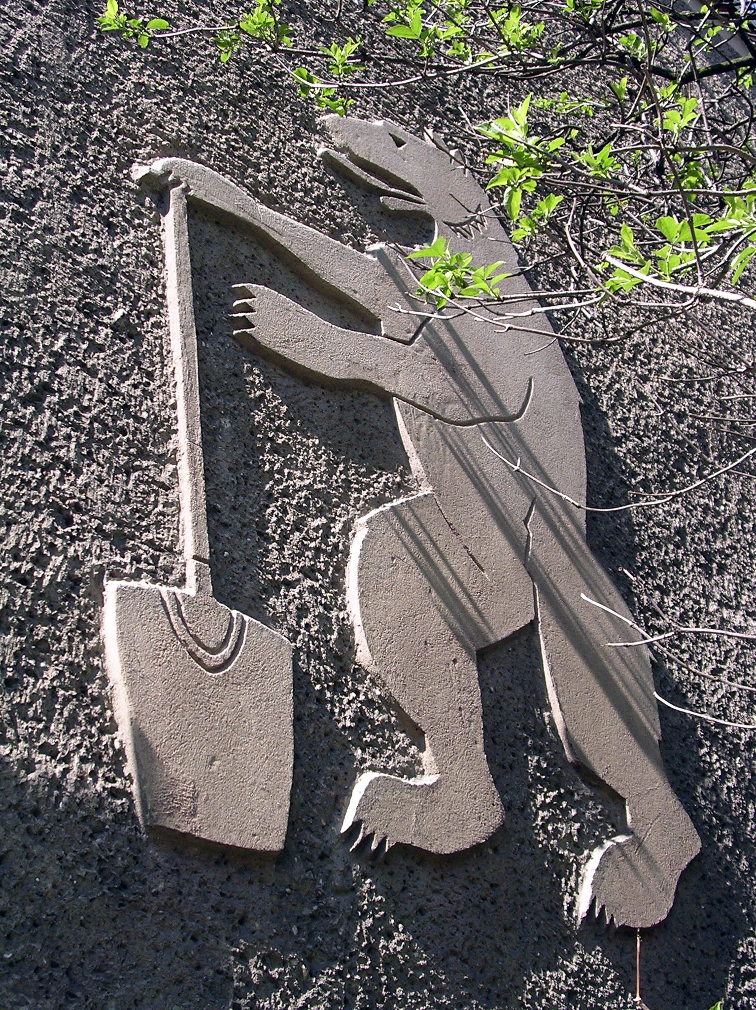 Das Symbol des Nationalen Aufbauwerks, der Bär mit dem Spaten, zierte bis zur Umgestaltung des Regenbogenhauses in der Kadiner Straße 9, Berlin-Friedrichshain 2005-2009 die straßenseitige Fassade. Das war ein Anlass für die Stadtdetektive im Kiez-Klub des Hauses, sich mit der Geschichte der Einrichtung zu befassen.